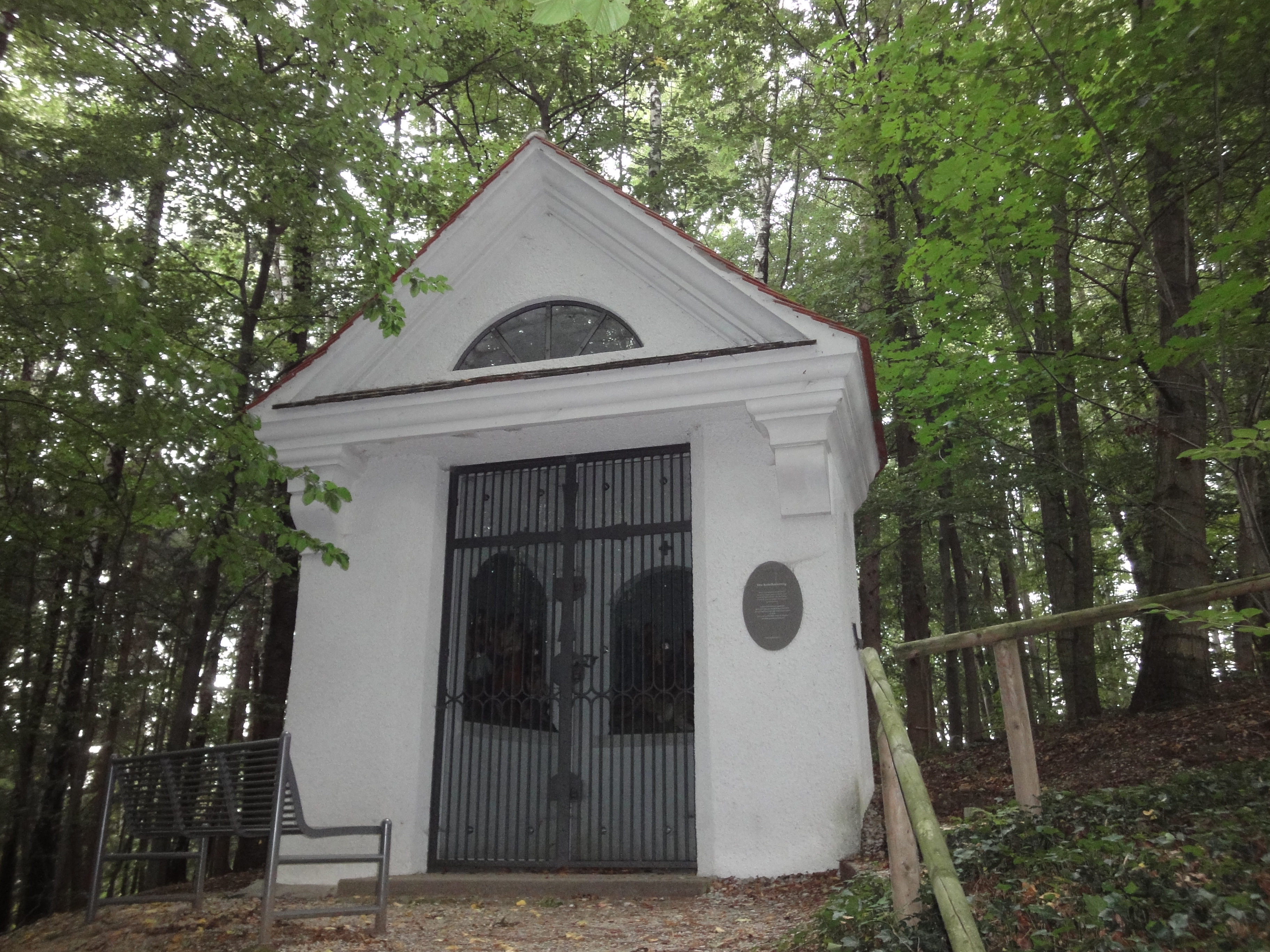 Kreuzwegstation in Neusäß-Westheim,am Westhang des Kobelberges, vier Bildstöcke mit jeweils drei Stationen, Satteldachbauten mit dreiseitigem Schluss und umlaufendem, profiliertem Gesims, von Anton Kinseher, 1936/37